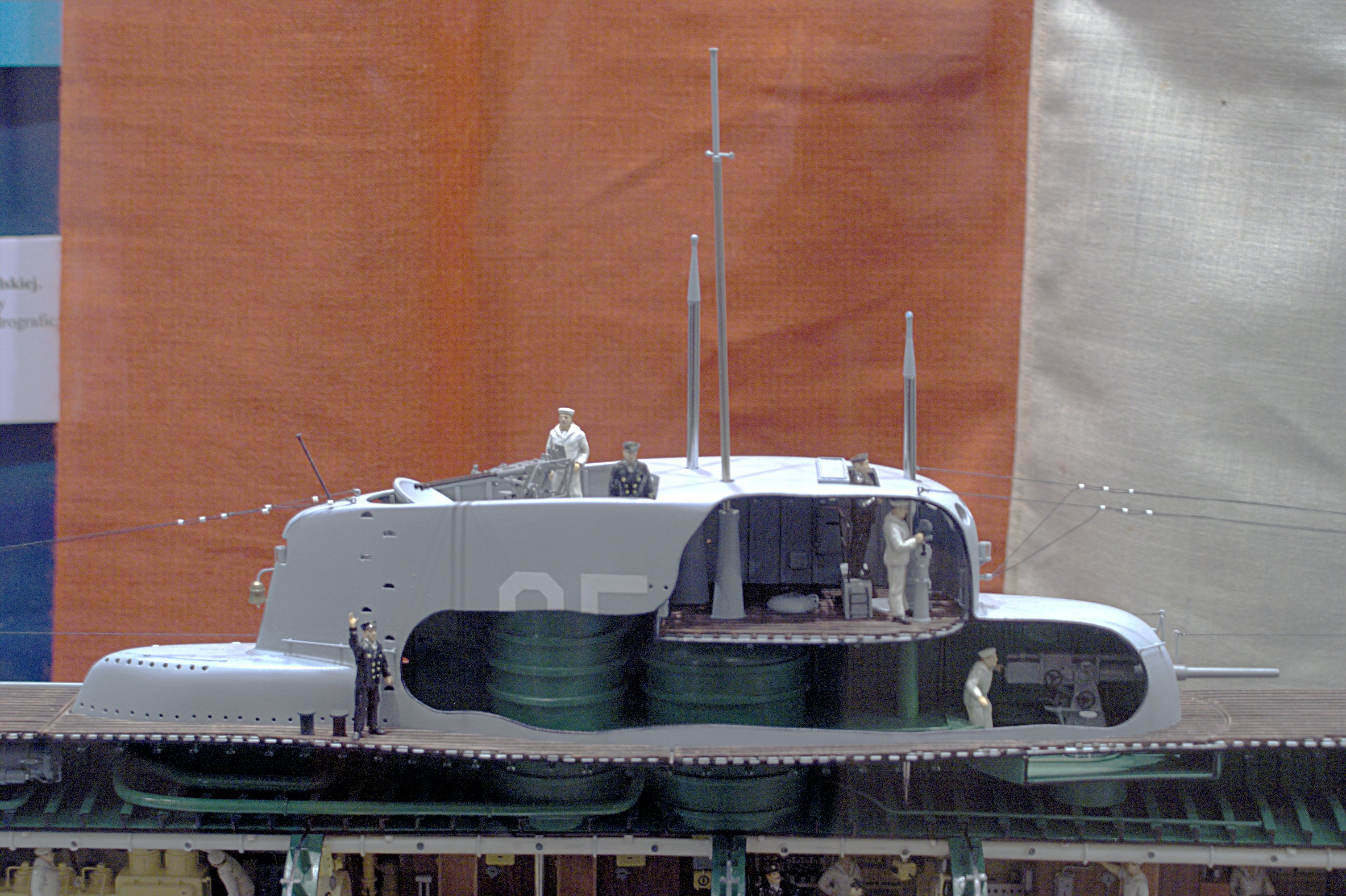 Model ORP Orzeł w Centralnym Muzeum Morskim